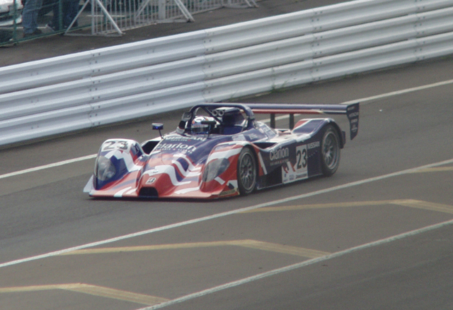 2003-9-15九十九治明撮影